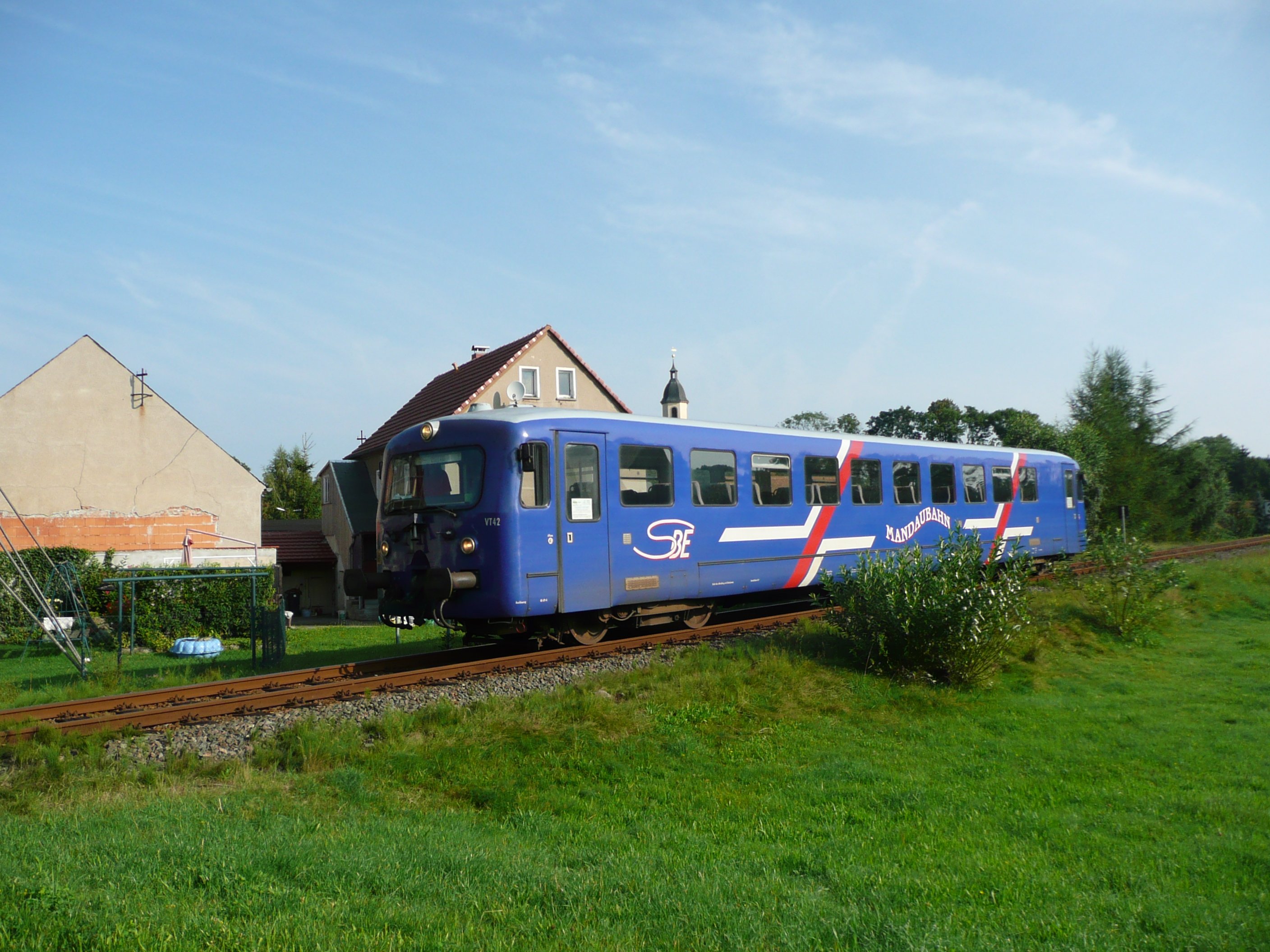 VT 42, der ehemalige AT 515 523 in Seifhennersdorf